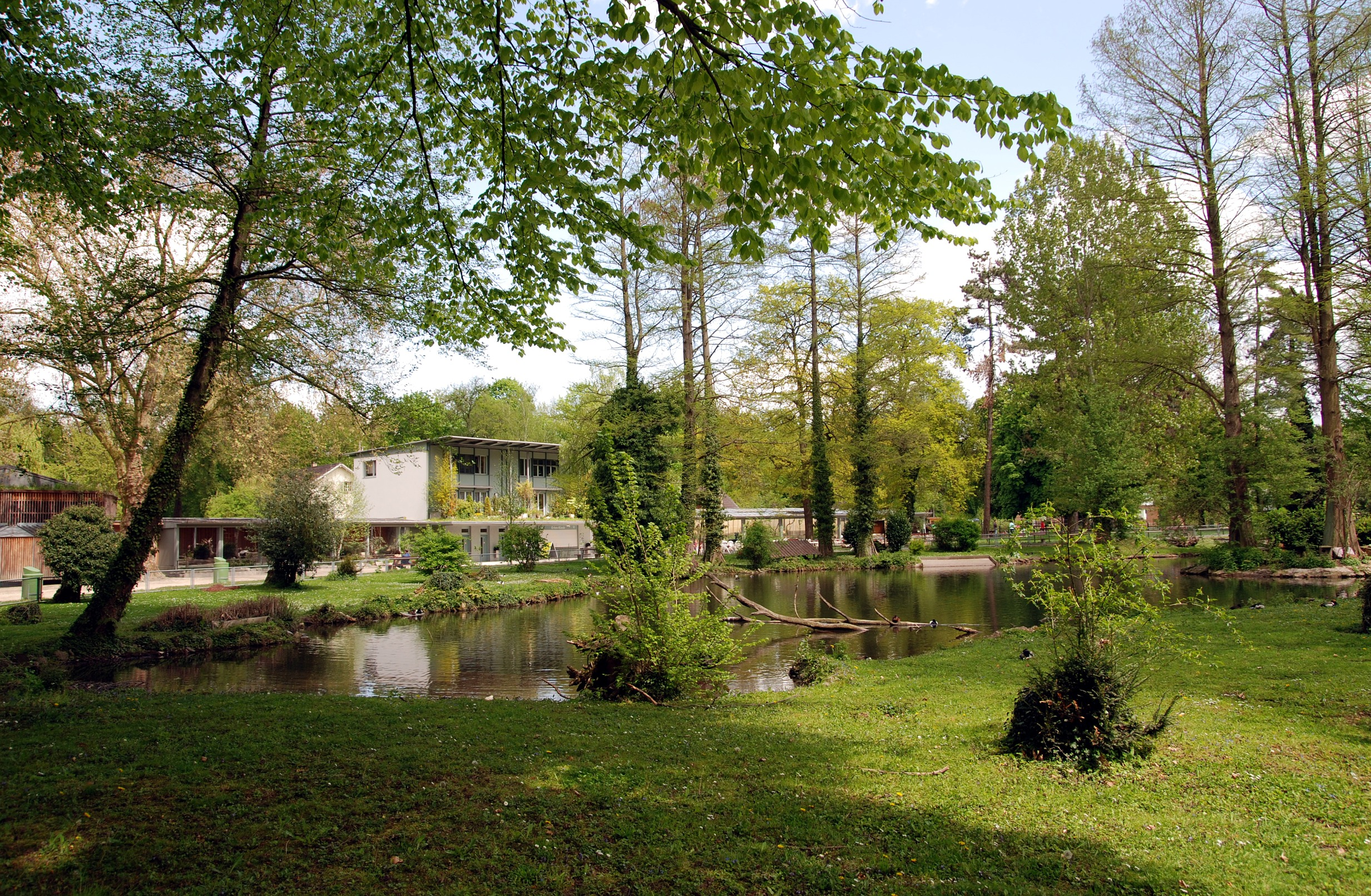 Tierpark Lange Erlen